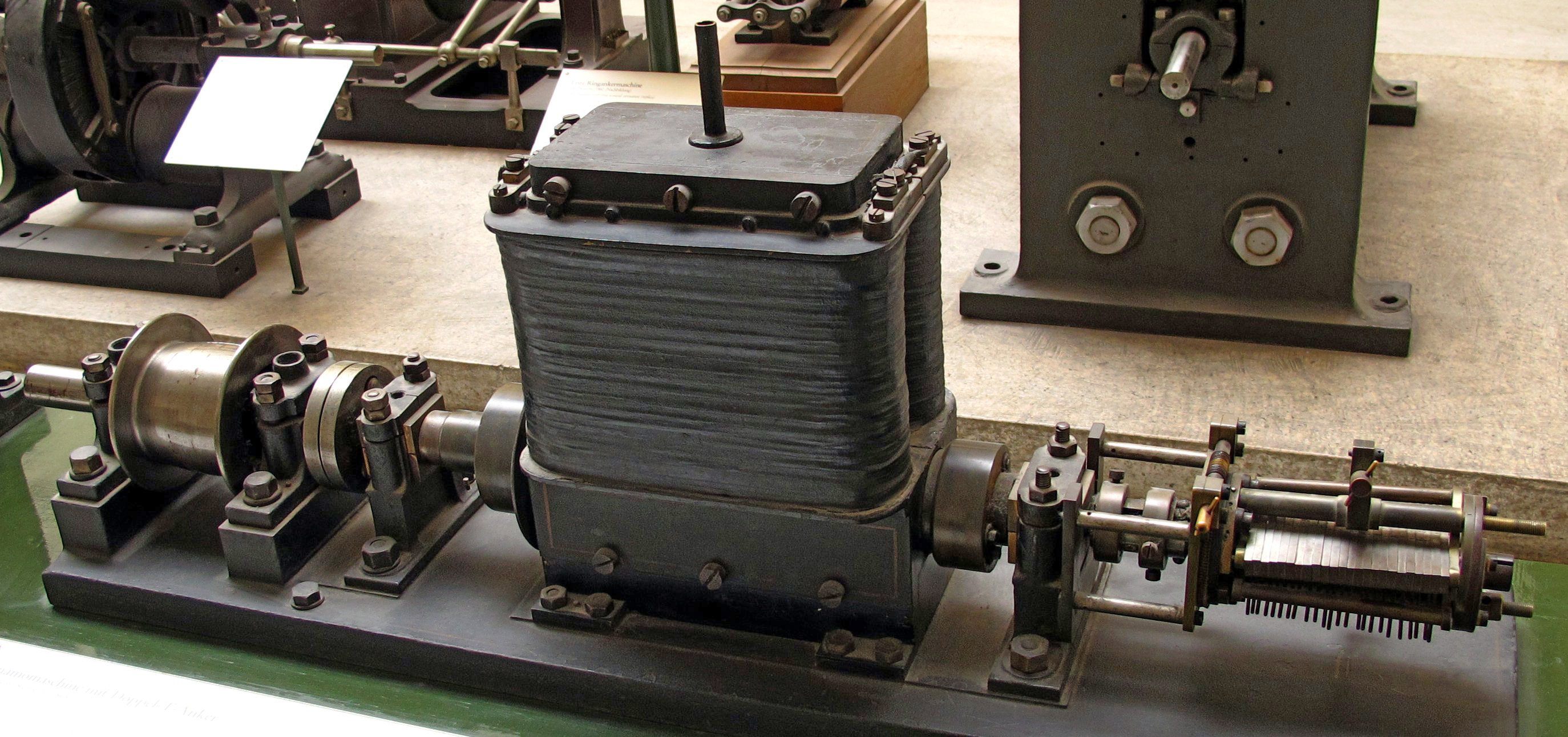 Erste Dynamomaschine mit Doppel-T-Anker mit praktischer Bedeutung von Werner von Siemens. 1873 war dieses Modell auf der Wiener Weltausstellung vorgeführt. Sie wurde als so genannte Erregermaschine eingesetzt, die Elektromagnete besitzen eine Wasserkühlung. Der Generator liefert bei 1000 Umdrehungen pro Minute 8 Ampere bei 20 Volt. Hersteller: Werner von Siemens, 1868